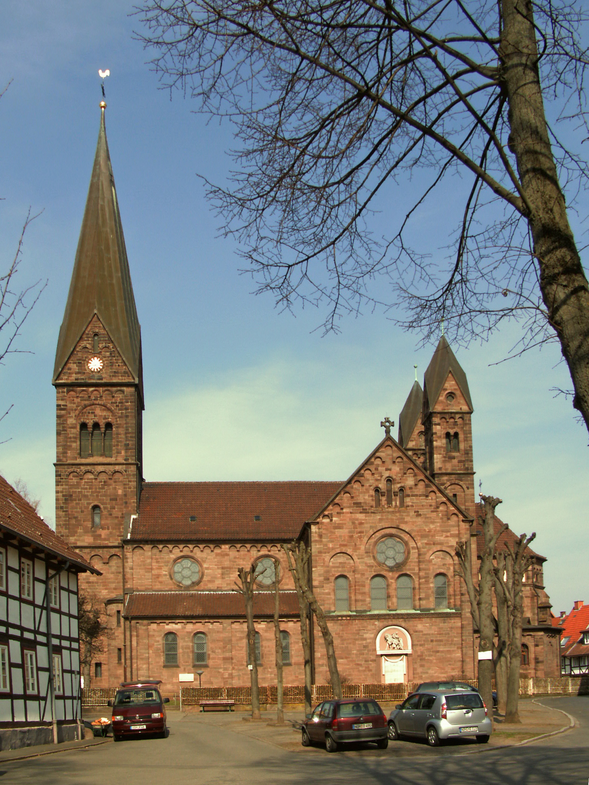 Katholische Kirche St. Martin in Nörten-Hardenberg, Landkreis Northeim